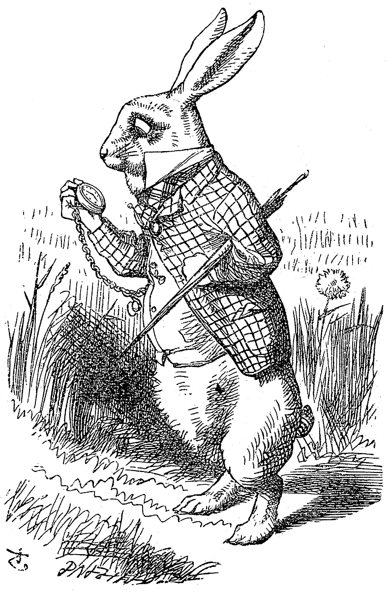 Illustration d'origine (1865), par John Tenniel (28 février 1820 – 25 février 1914), du roman de Lewis Carroll, Alice au pays des merveilles.